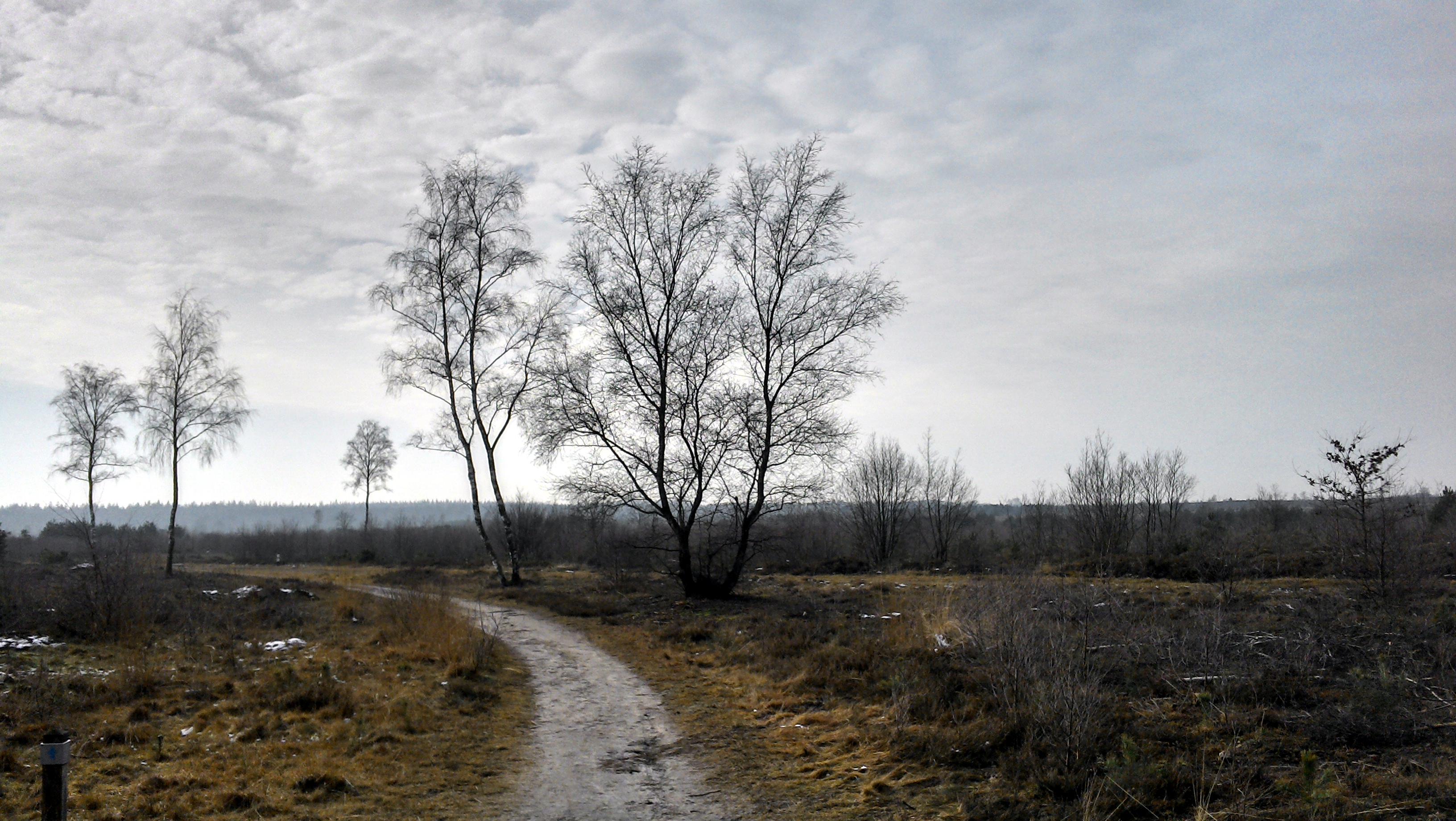 Sallandse heuvelrug